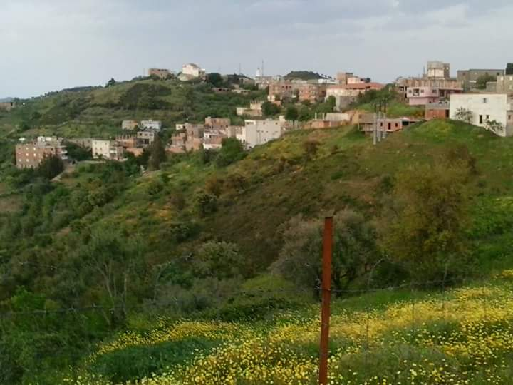 le village de ighil bouchene